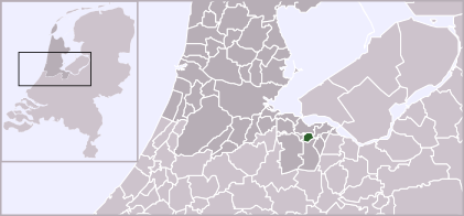 Locatie gemeente Bussum. Afbeelding gemaakt door gebruiker:Mtcv en vrij te gebruiken.